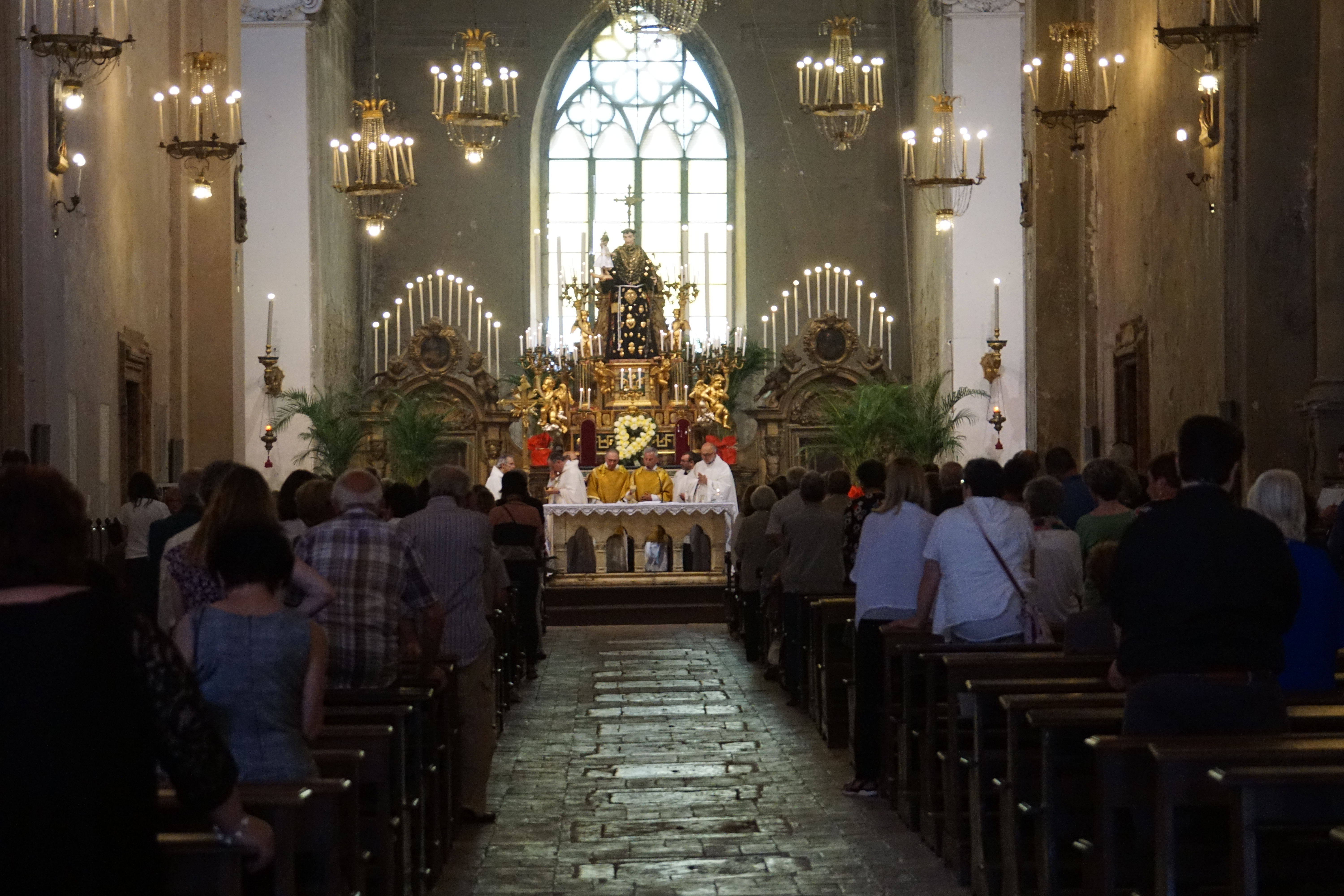 chiesa di San Francesco This is a photo of a monument which is part of cultural heritage of Italy. Questa è una foto di un bene culturale italiano che partecipa al concorso Wiki Loves Valle del Primo Presepe 2019, gestito in coperazione con Wikimedia Italia. This is a photo of a monument which is part of cultural heritage of Italy. This monument participates in the contest Wiki Loves Valle del Primo Presepe 2019, operated in cooperation with Wikimedia Italia.